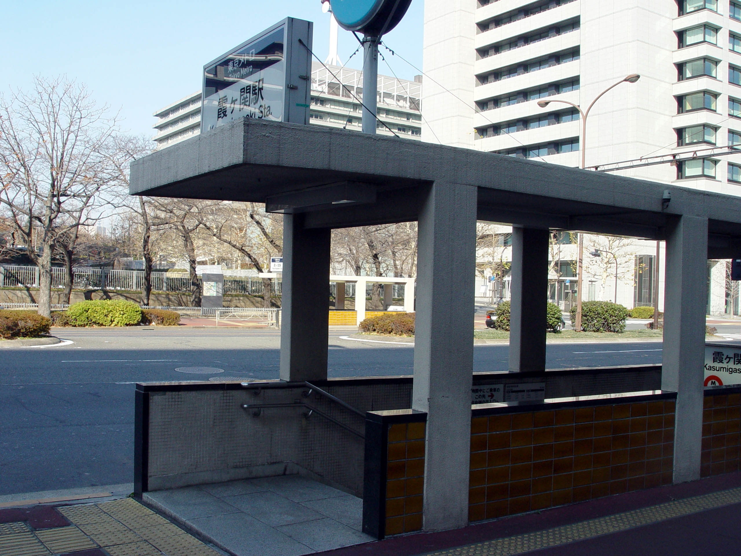 Kasumigaseki Station, Tokyo, Japan 霞ヶ関駅（東京）